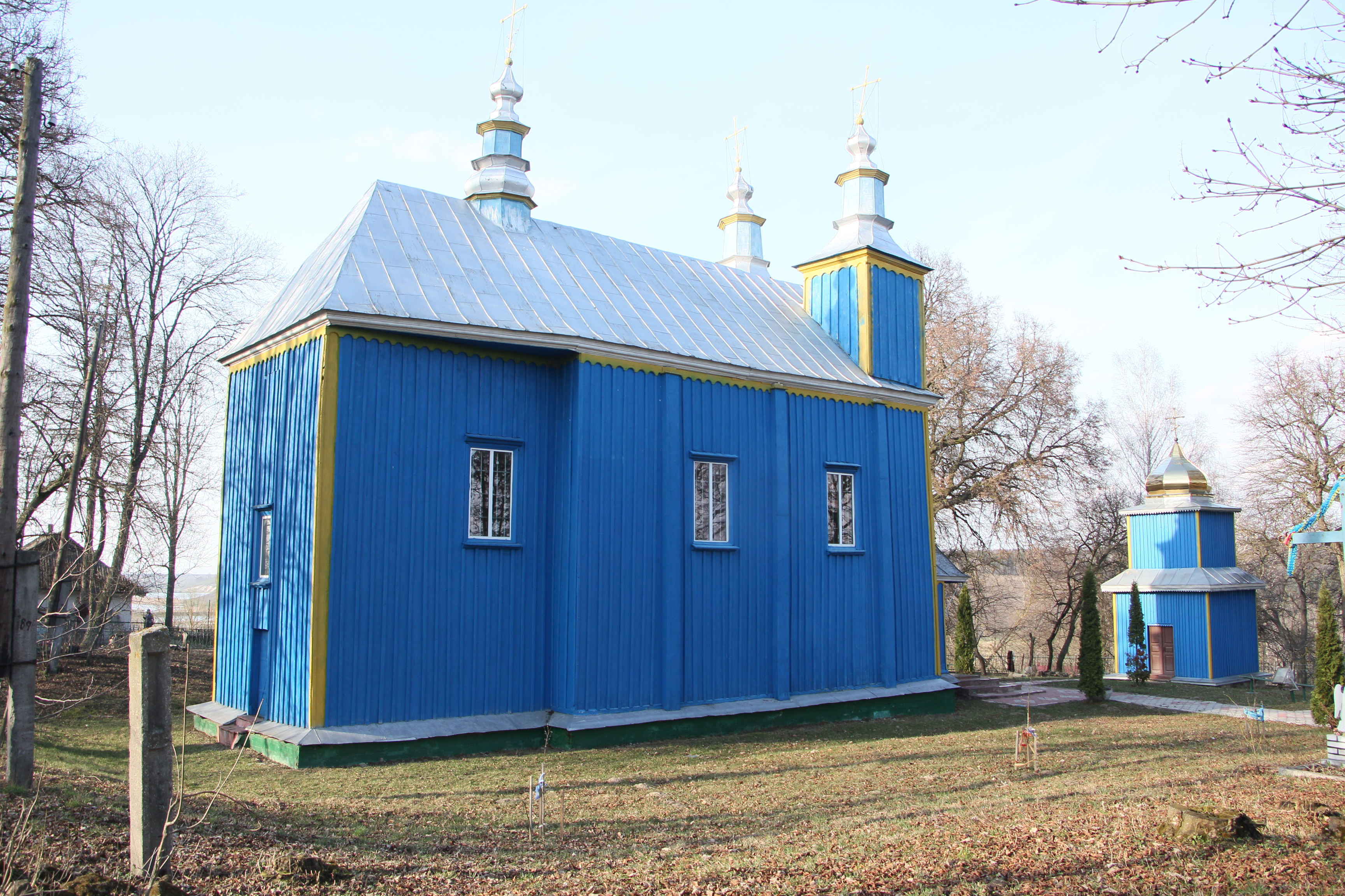 Дерев'яна церква в селі Молотків Лановецького району, Тернопільської області